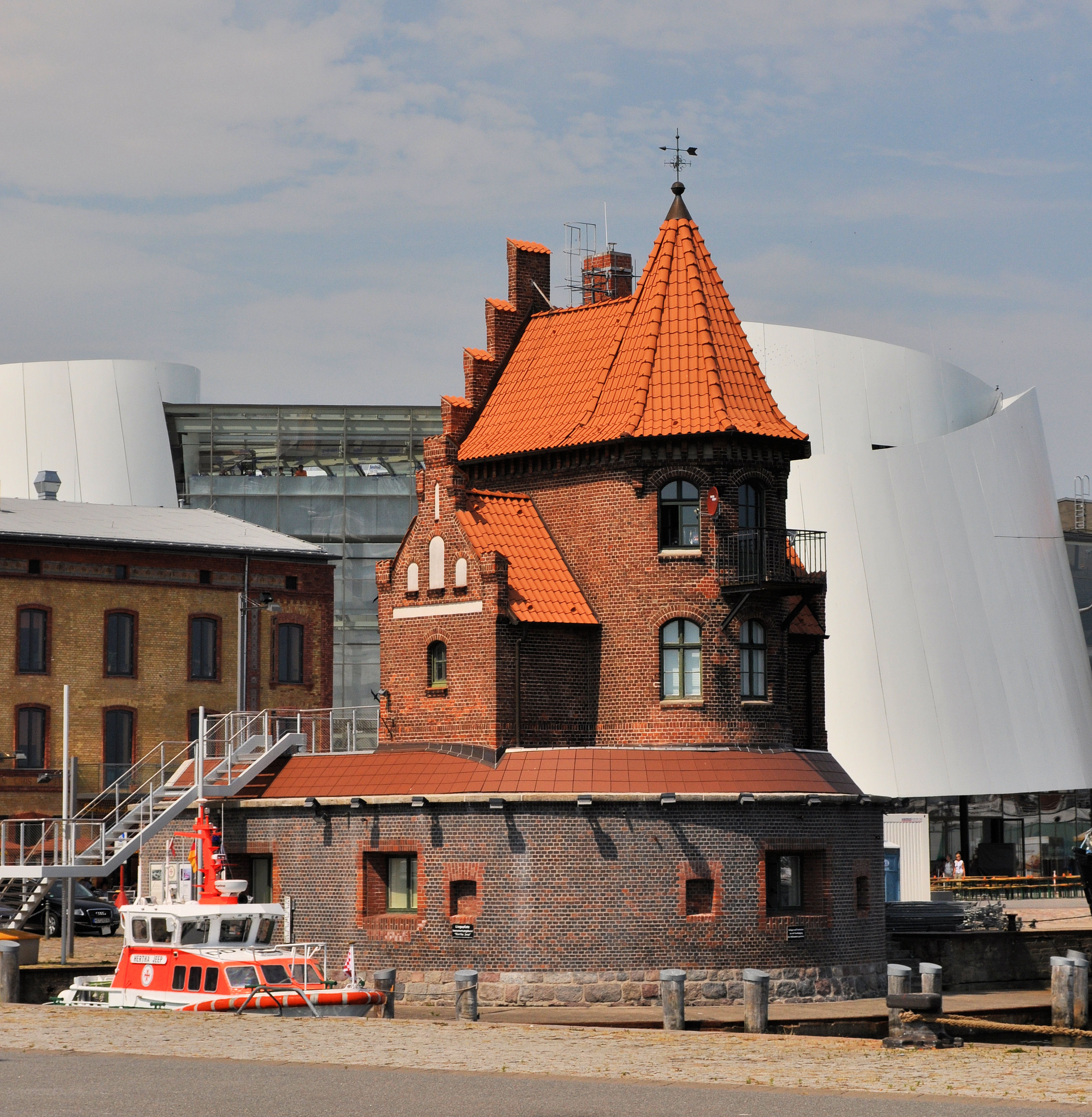 Das Lotsenhaus Stralsund. Im Hintergrund das Ozeaneum Stralsund, vor dem Lotsenhaus das Rettungsschiff Hertha Jeep (Schiff).